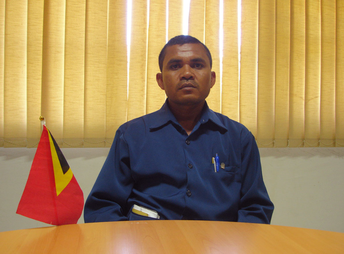 Fausto Soares Dias, Administrator des Subdistrikts Metinaro